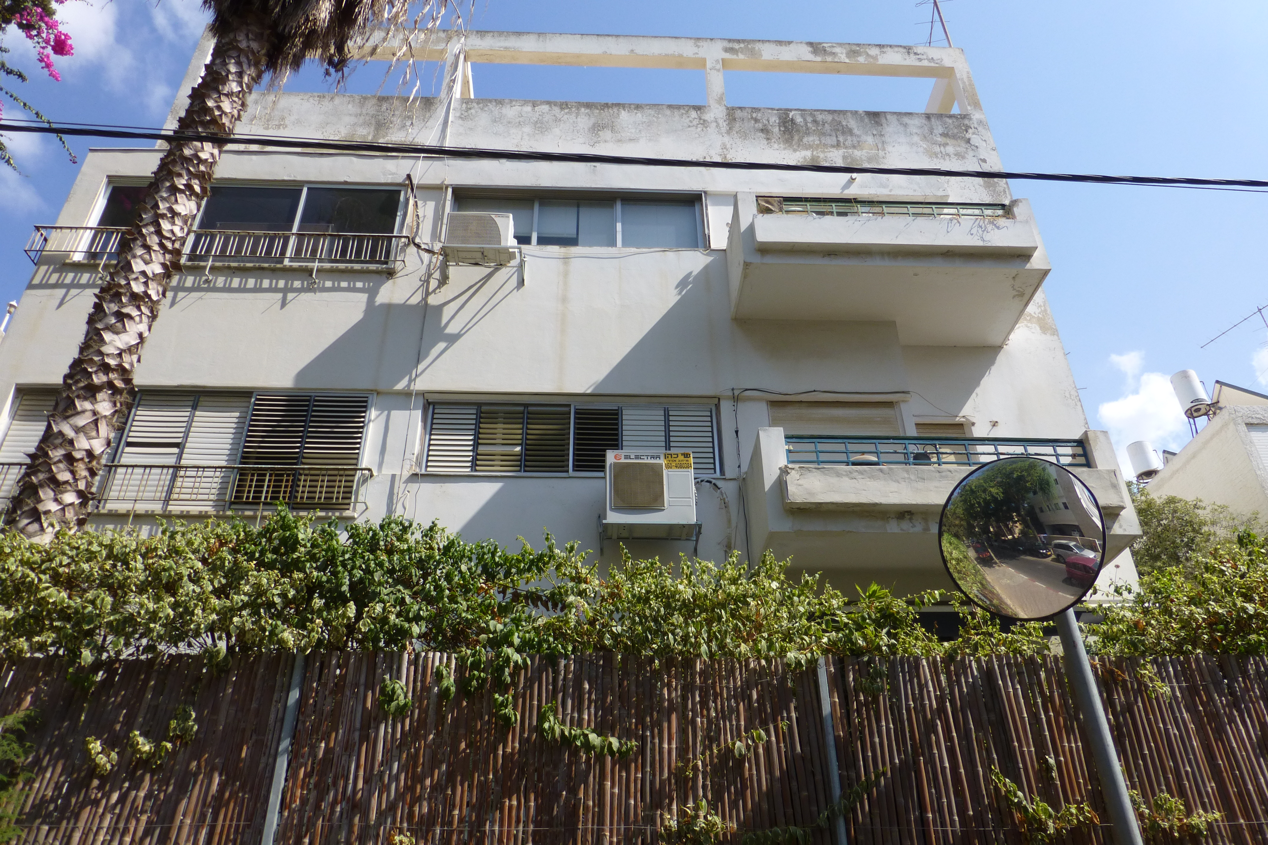 בית רוזנפלד בית הרופאים